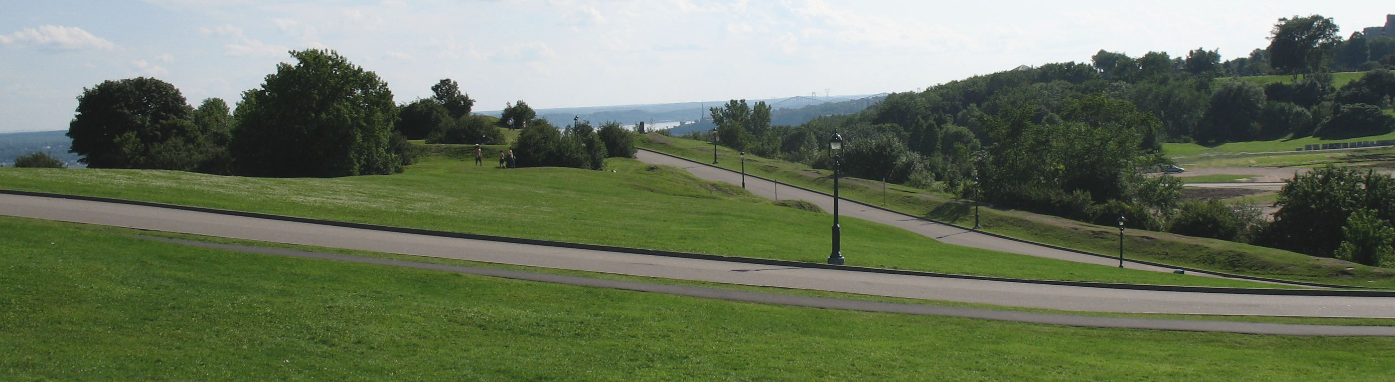 Plaines d'Abraham, Québec, Canada